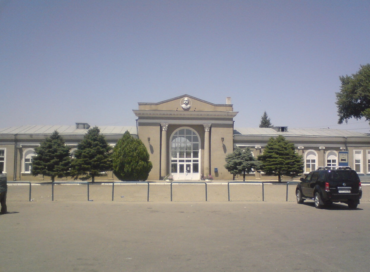 Вид с привокзальной площади